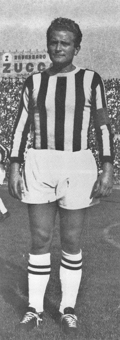 Il calciatore italiano Giampiero Boniperti per la prima volta con la fascia di capitano della Juventus.